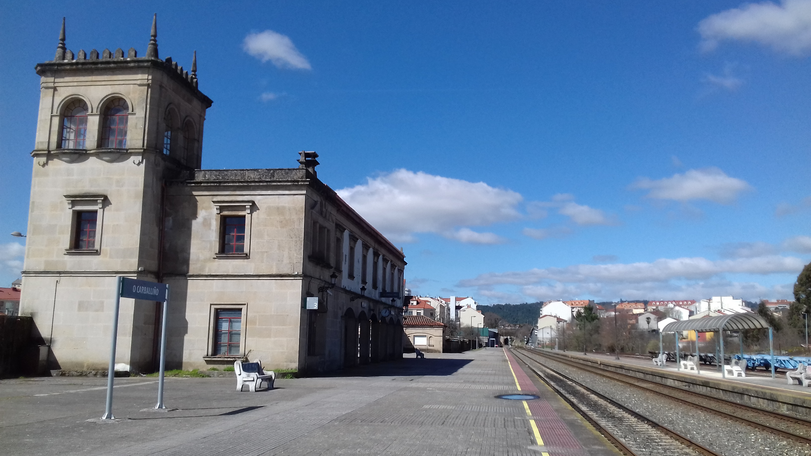 Estación do Carballiño